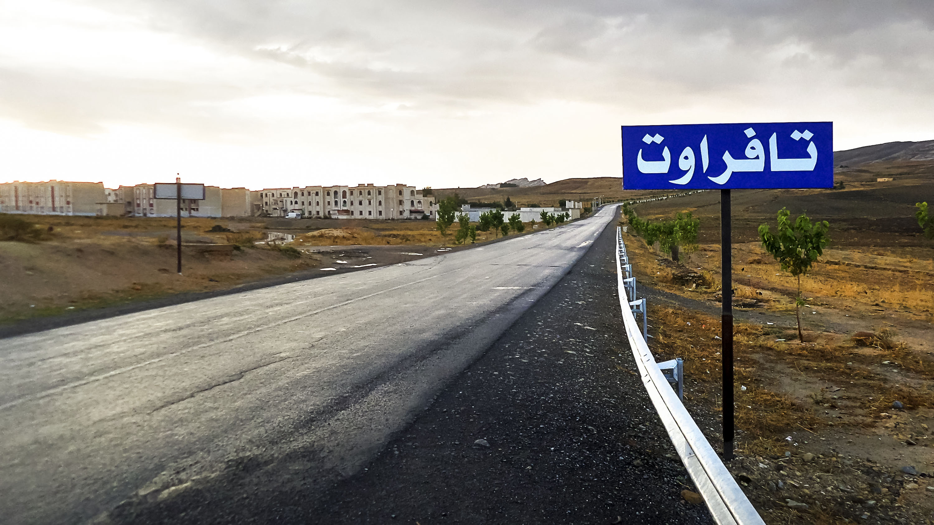 Commune de Tafraout, daira de Chellalet El Adhaoura, wilaya de Médéa بلدية تافراوت، دائرة شلالة العذاورة، ولاية المدية